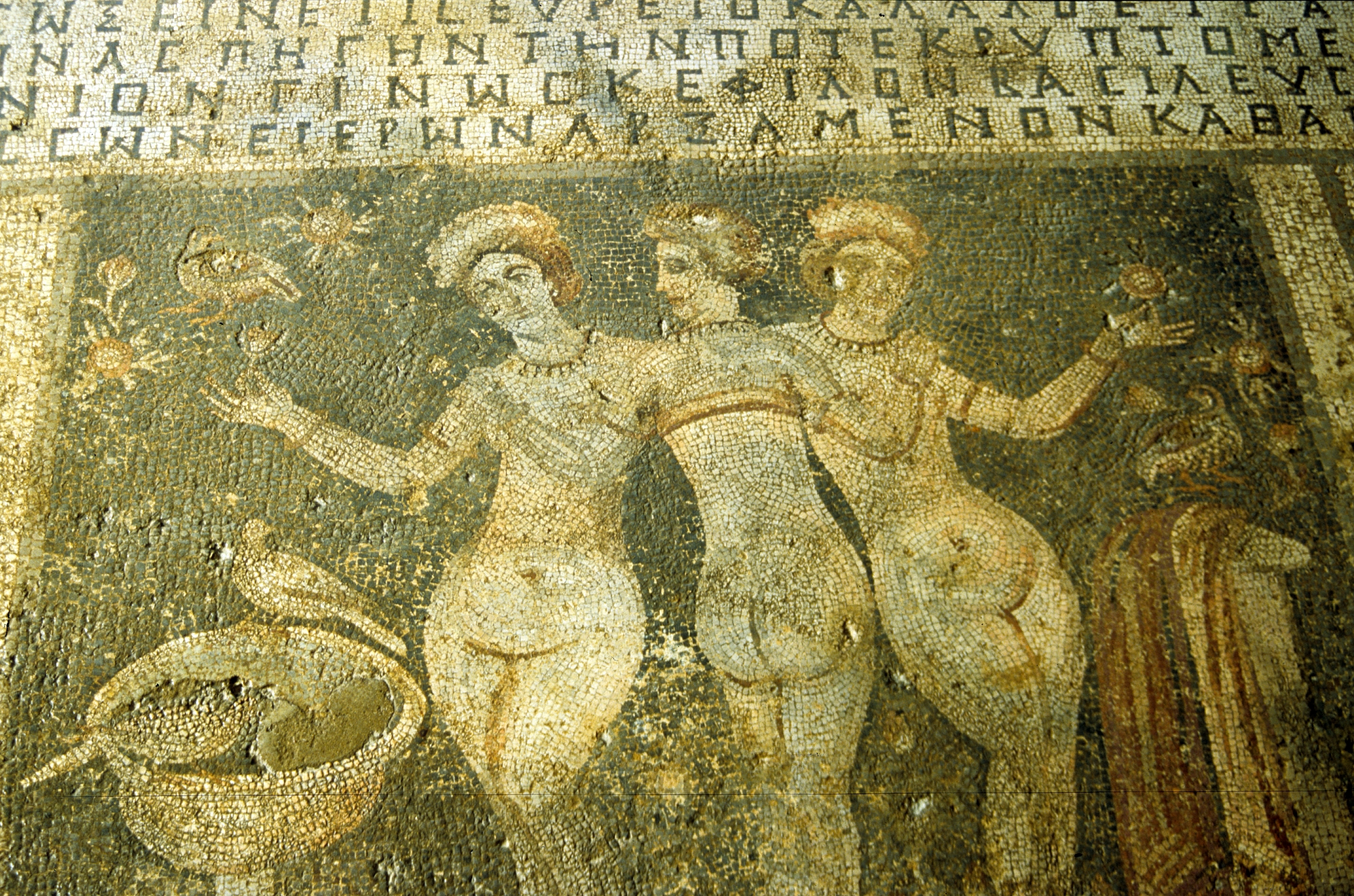 Mosaik der Drei Grazien in Narlikuyu bei Silifke, Südtürkei